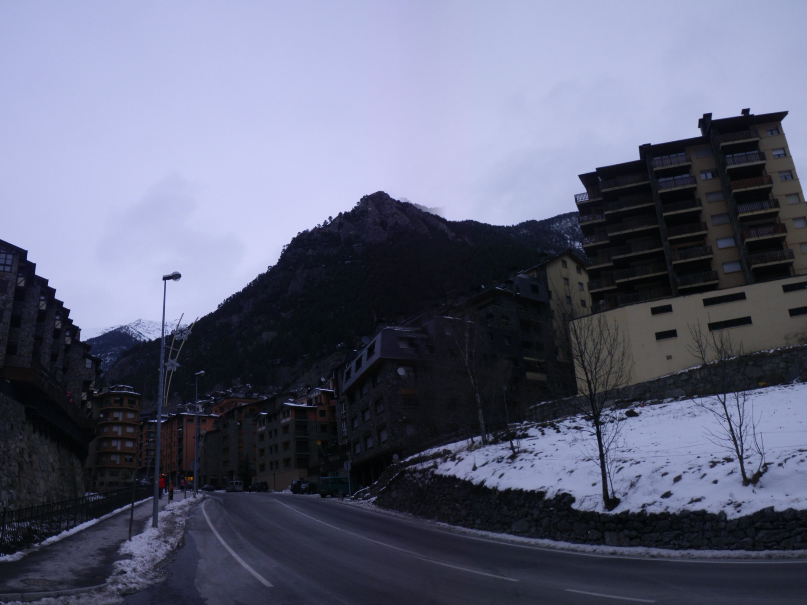 CG-5, 36, AD400 Mas de Ribafeta, Andorra